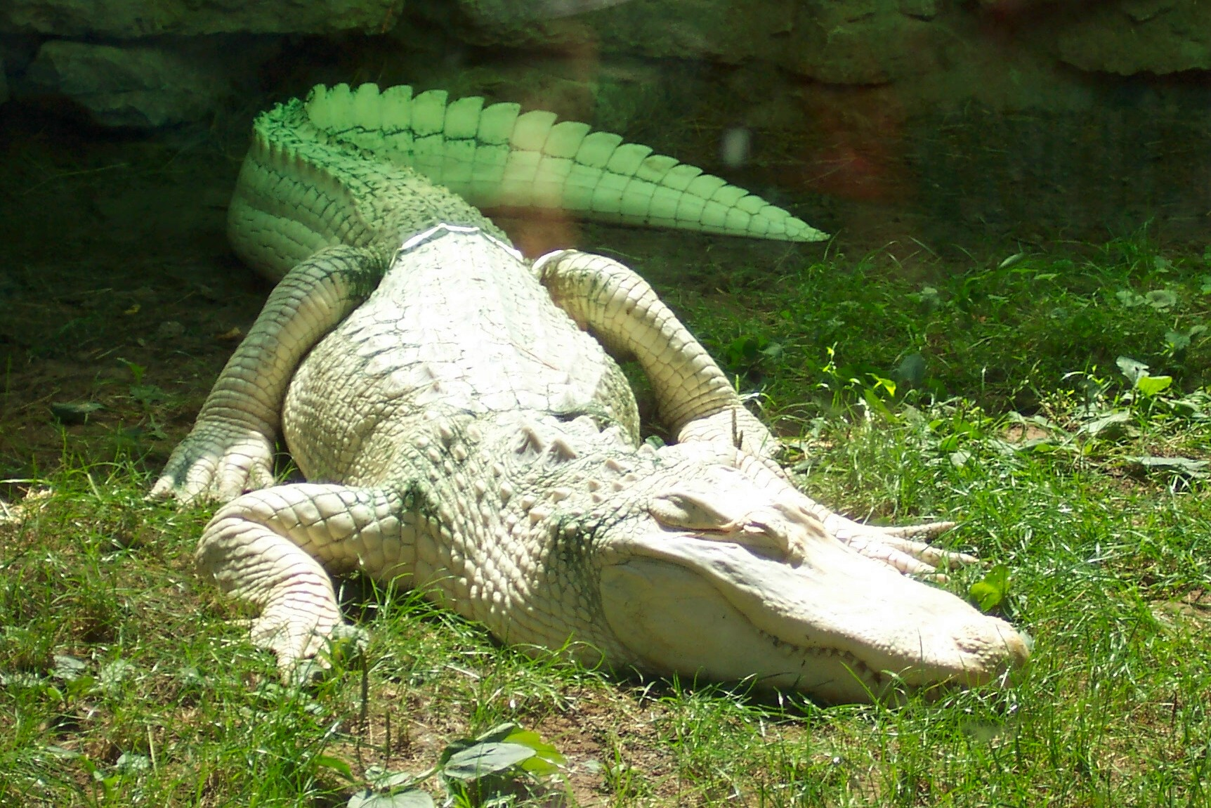 Albino alligator